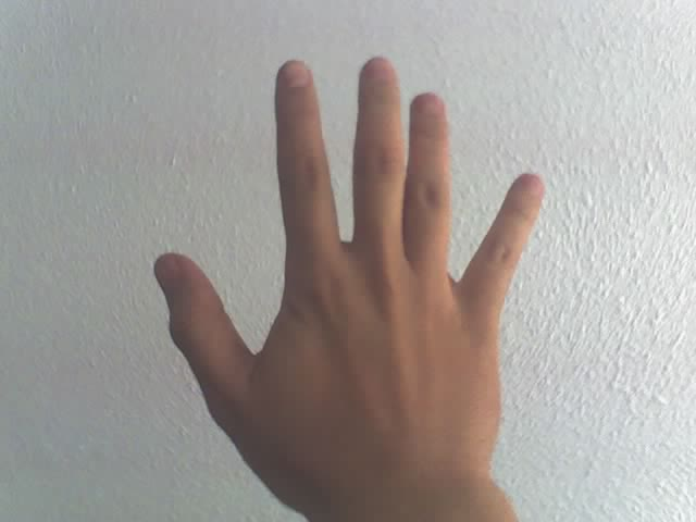 mano